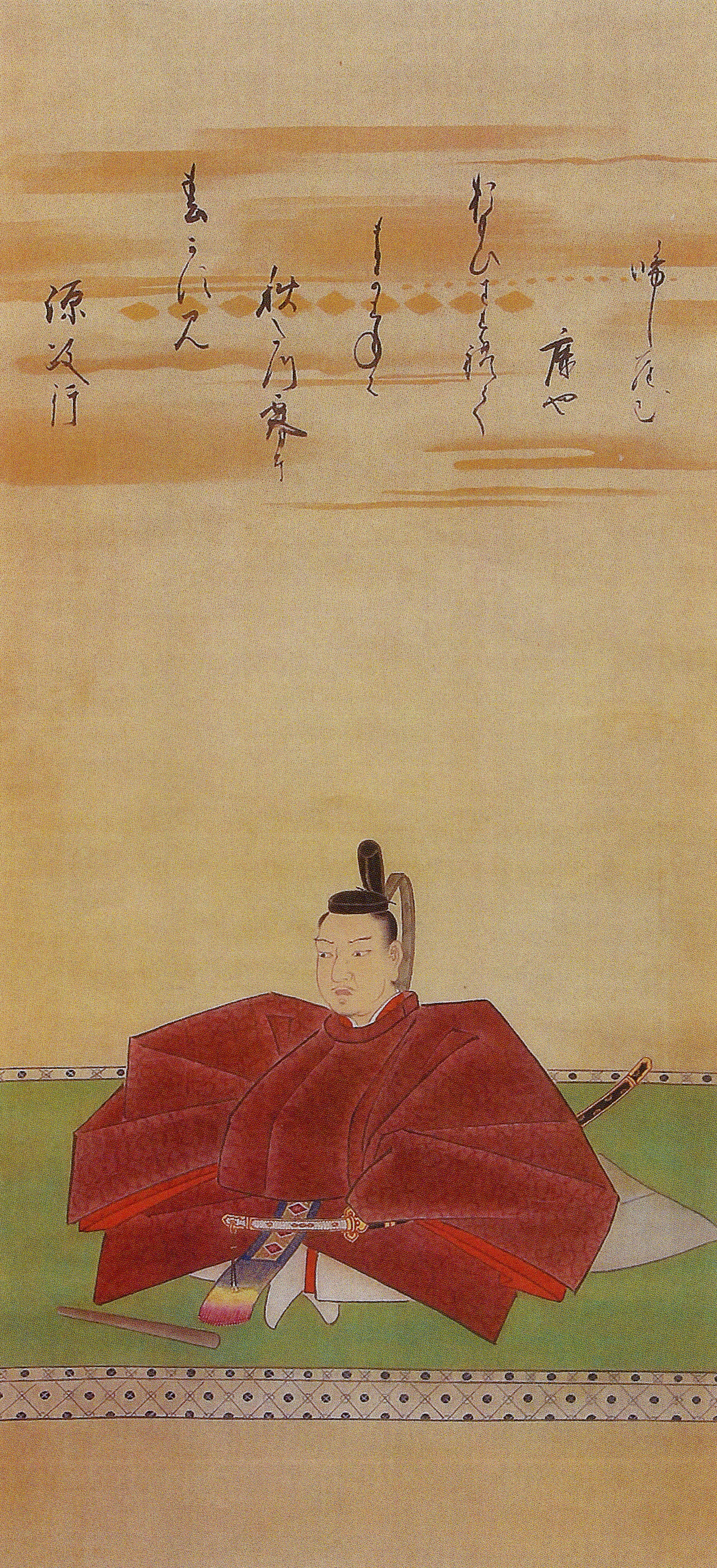 南部氏13代当主・南部政行の肖像画。